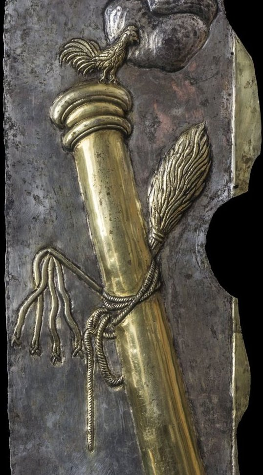 Фрагмент ризи Чудотворної ікони Розп'яття з Зарваниці з знаряддями Страстей Господніх